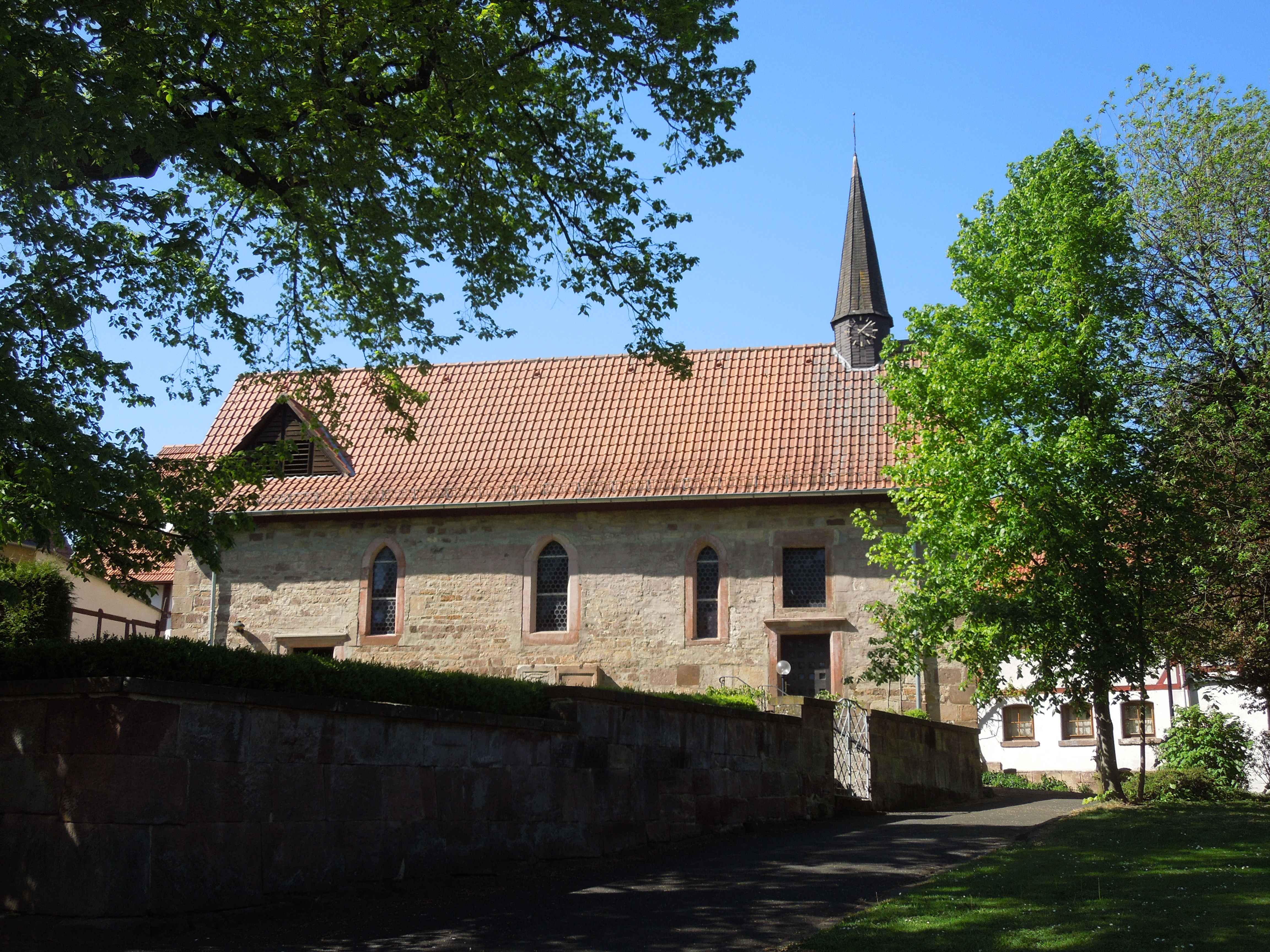 Dorfkirche in Wehren